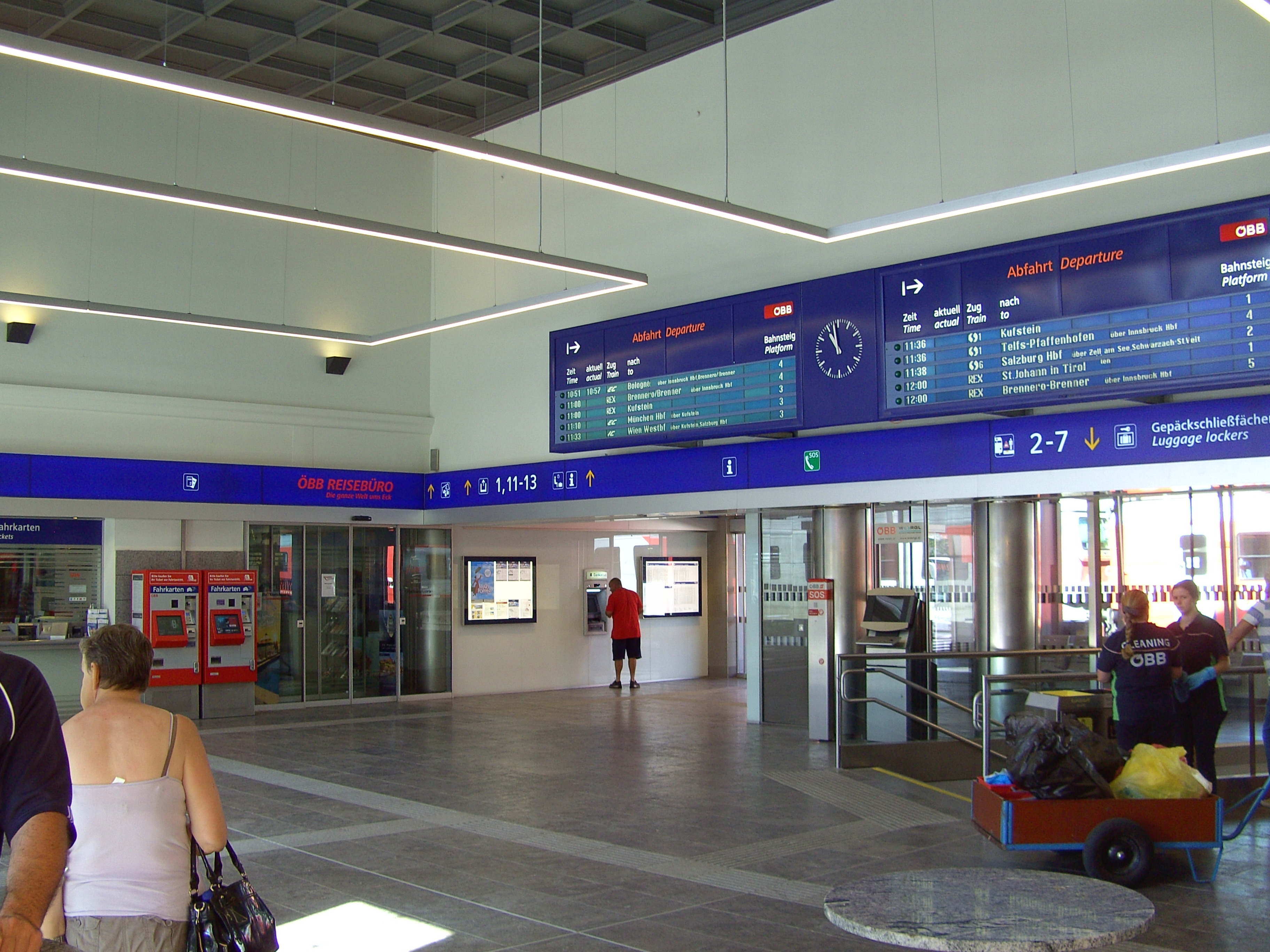 Wörgl Hauptbahnhof - Abfahrtshalle 2015 (2)